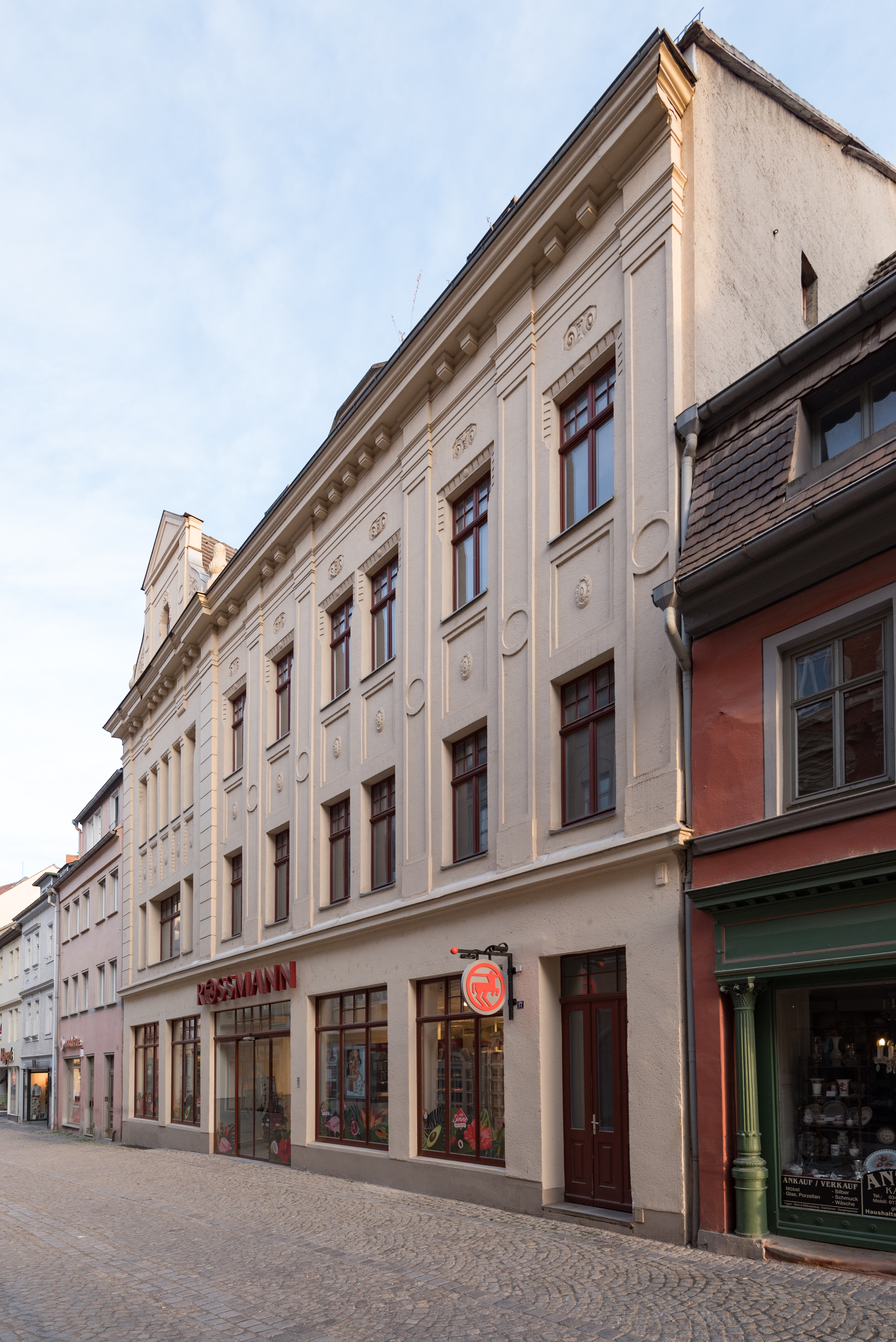 Naumburg (Saale), Herrenstraße 16, 17